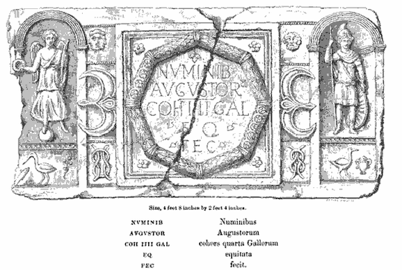 Römische Altarinschrift für den vergöttlichten Kaiser, gesetzt von der IIII. Kohorte der Gallier, Fundort Risingham (GB), vor 1599.